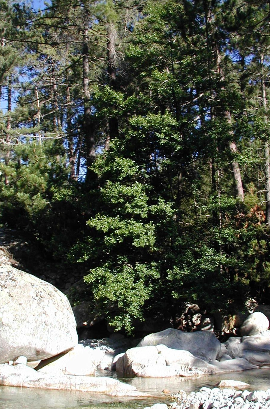 Alnus cordata: Habitat on Corsica